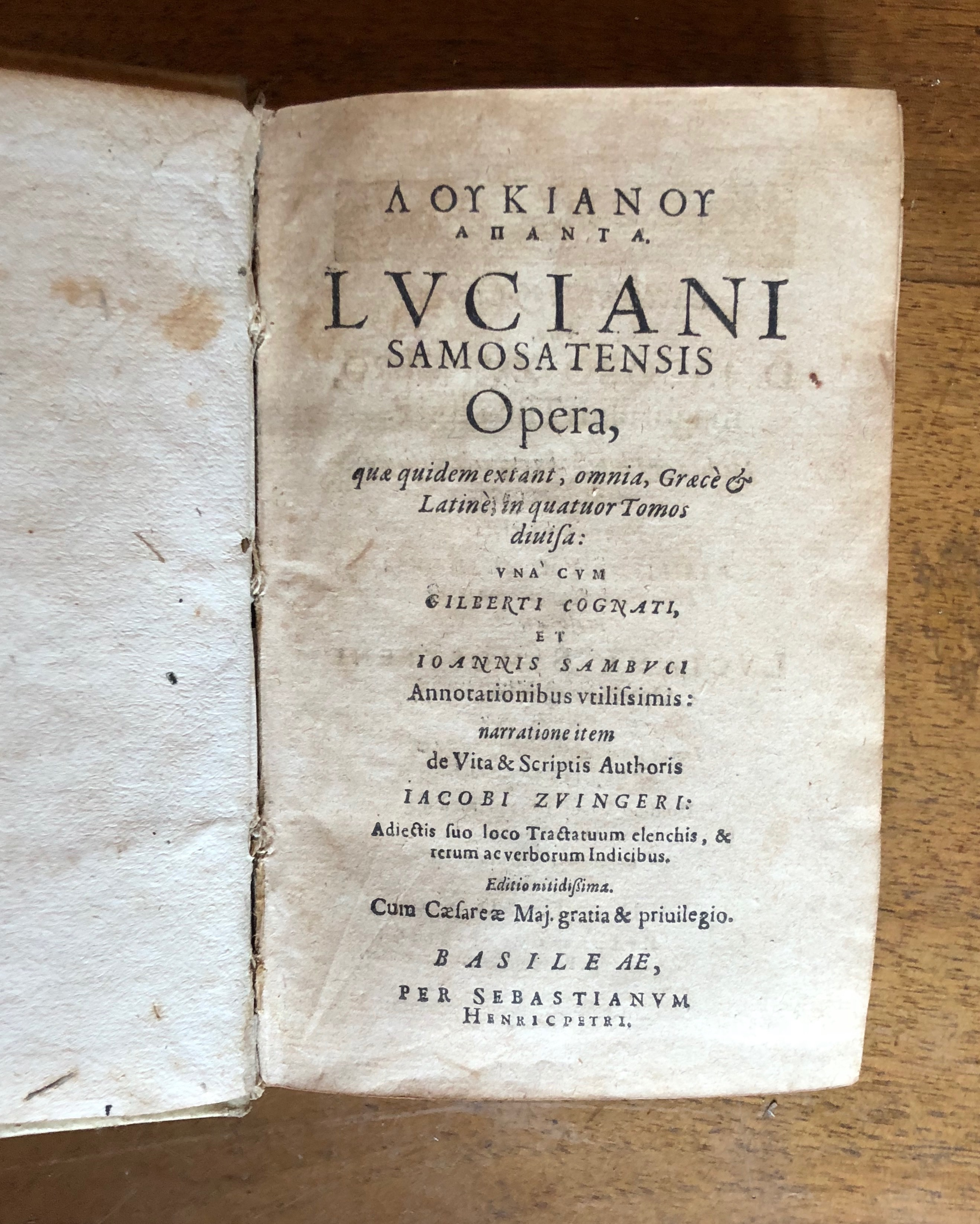 Lukian von Samosata